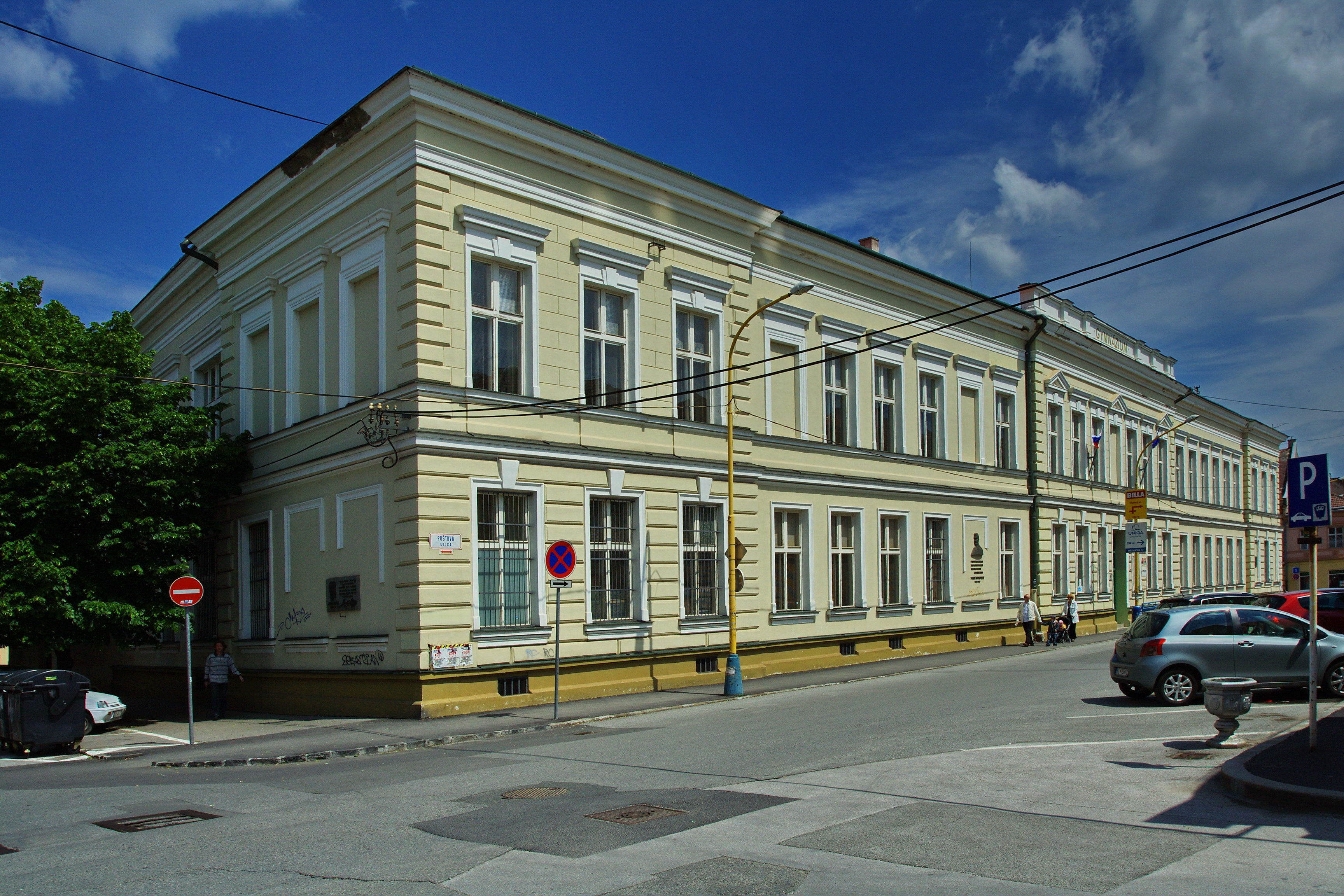 Gymnázium Poštová, Košice, Slovakia